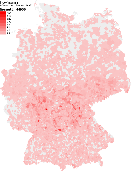 Verteilung des Nachnamens Hofmann in Deutschland nach dem Telefonbuch mit Stand vom 6. Januar 2005 Source: selbst erstellt Ersteller: W. Baumgartner